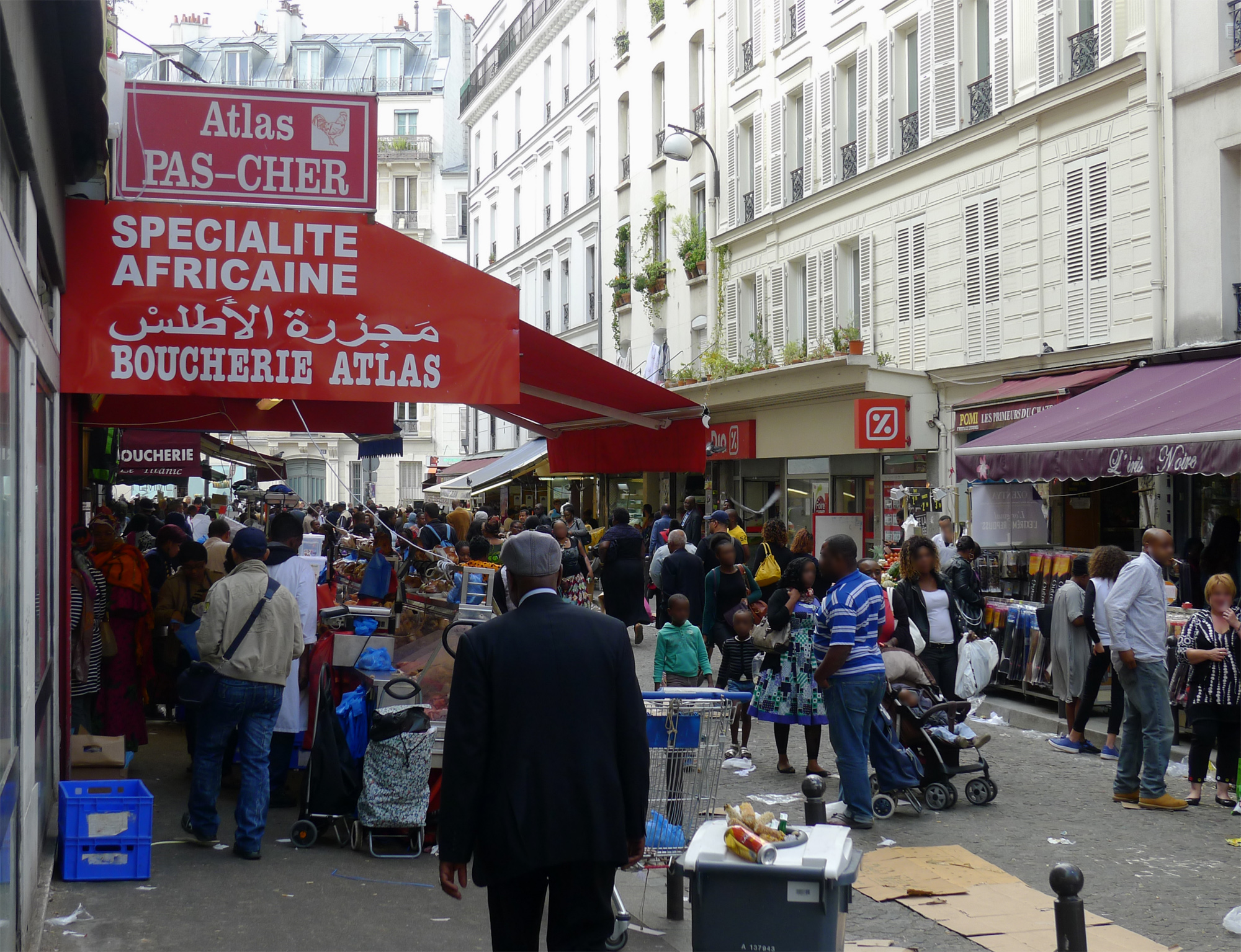 Rue Dejean - Paris XVIII